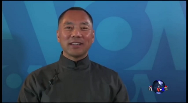 郭文贵接受美国之音专访